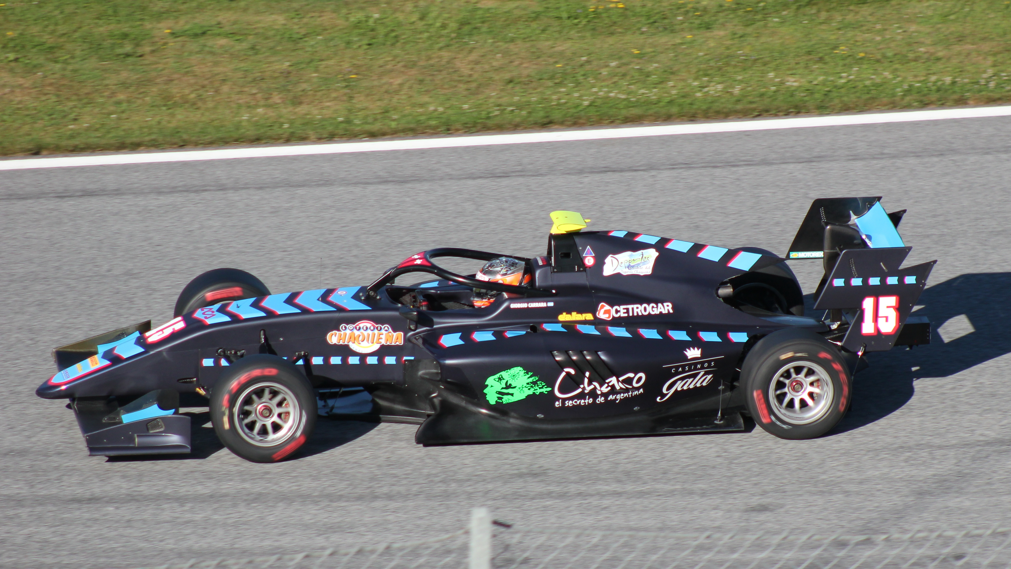 Carrara beim Rennwochenende in Österreich 2019